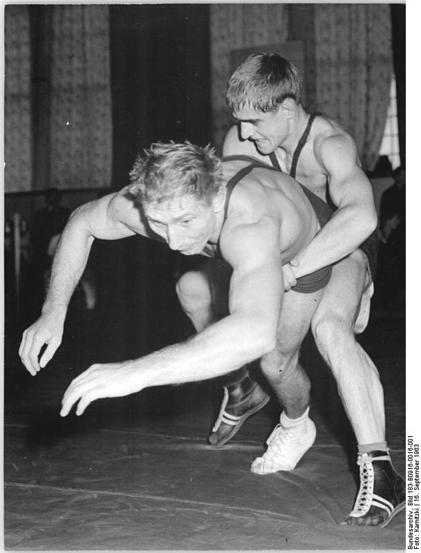 E. Schulz, Franke Zentralbild Karnitzki 16.9.1963 Deutsche Meisterschaften im Klassischen Ringkampf vom 13.-15.9.1963 in der Sporthalle Tschaikowski-Strasse in Rostock. UBz: Im Leichtgewicht konnte E.Schulz (ASK-hinten), hier im Kampf mit Franke (SC Leipzig) seinen Meistertitel erfolgreich verteidigen. Auch über Franke wurde er einstimmiger Punktsieger.